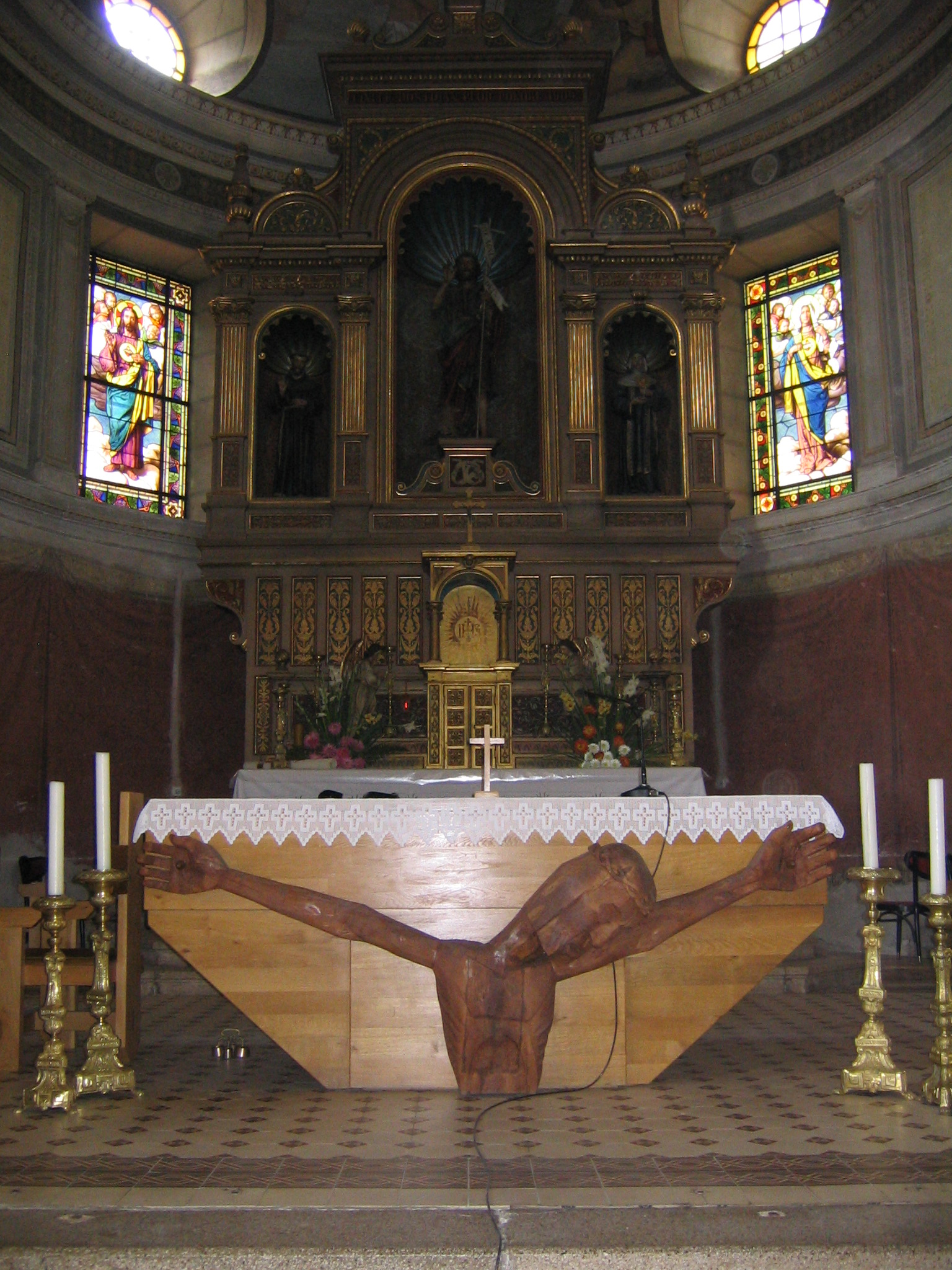 Samostan u Kraljevoj Sutjesci, je franjevački samostan u Vrhbosanskoj nadbiskupiji, u Kraljevoj Sutjesci, općina Kakanj, Bosna i Hercegovina. Proglašen je za nacionalni spomenik Bosne i Hercegovine.